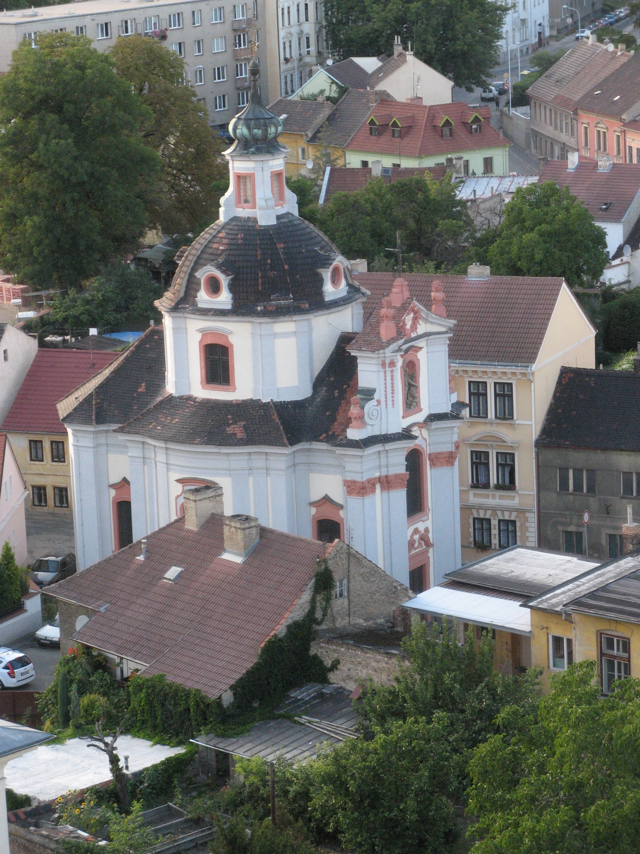 Octavio Broggio, kostel sv. Václava, Litoměřice